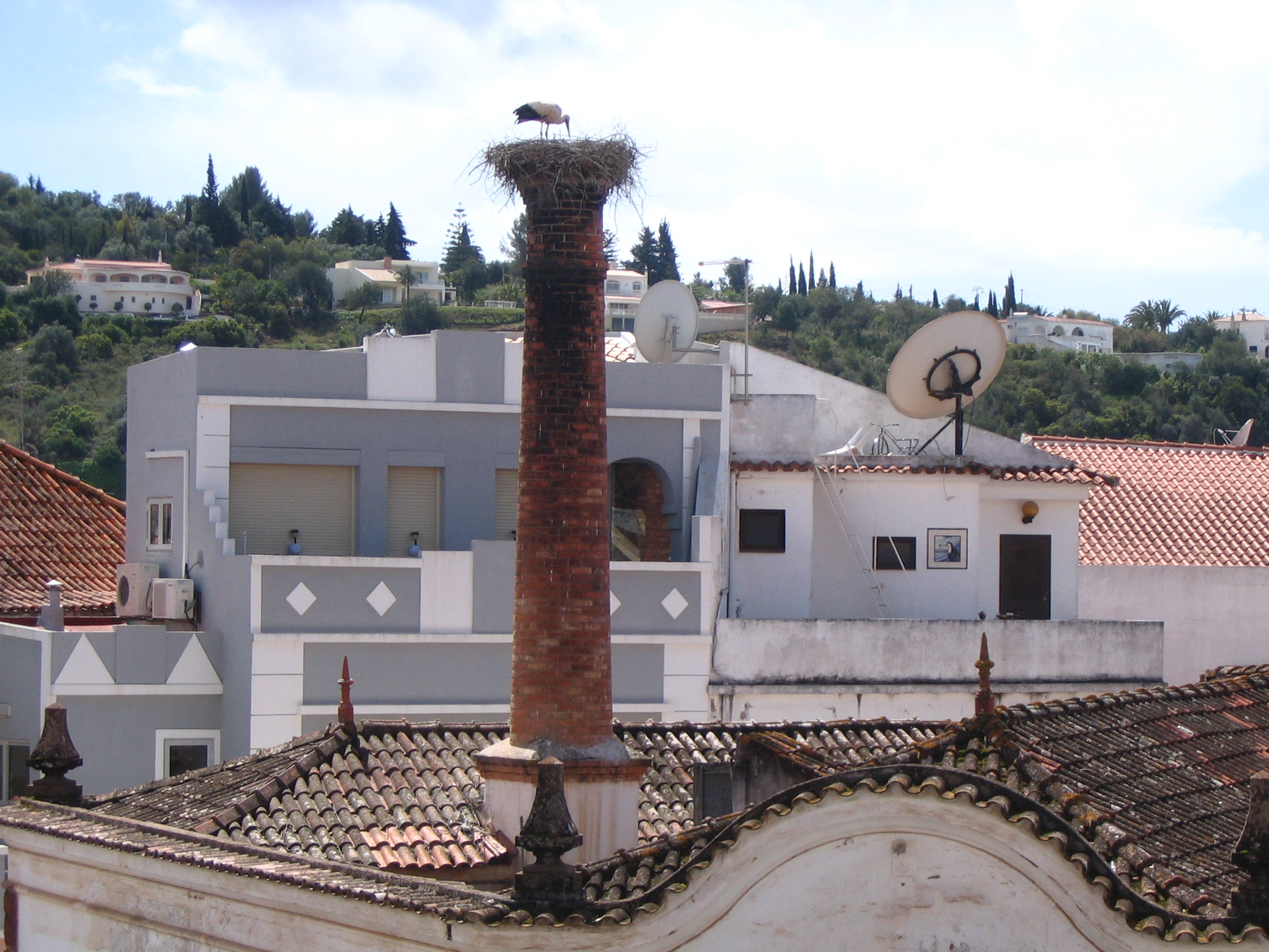 Silves ( Algarve - Portugal )- Cigogne sur une cheminée de la ville.